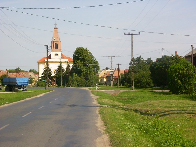 Bogyoszló katolikus temploma